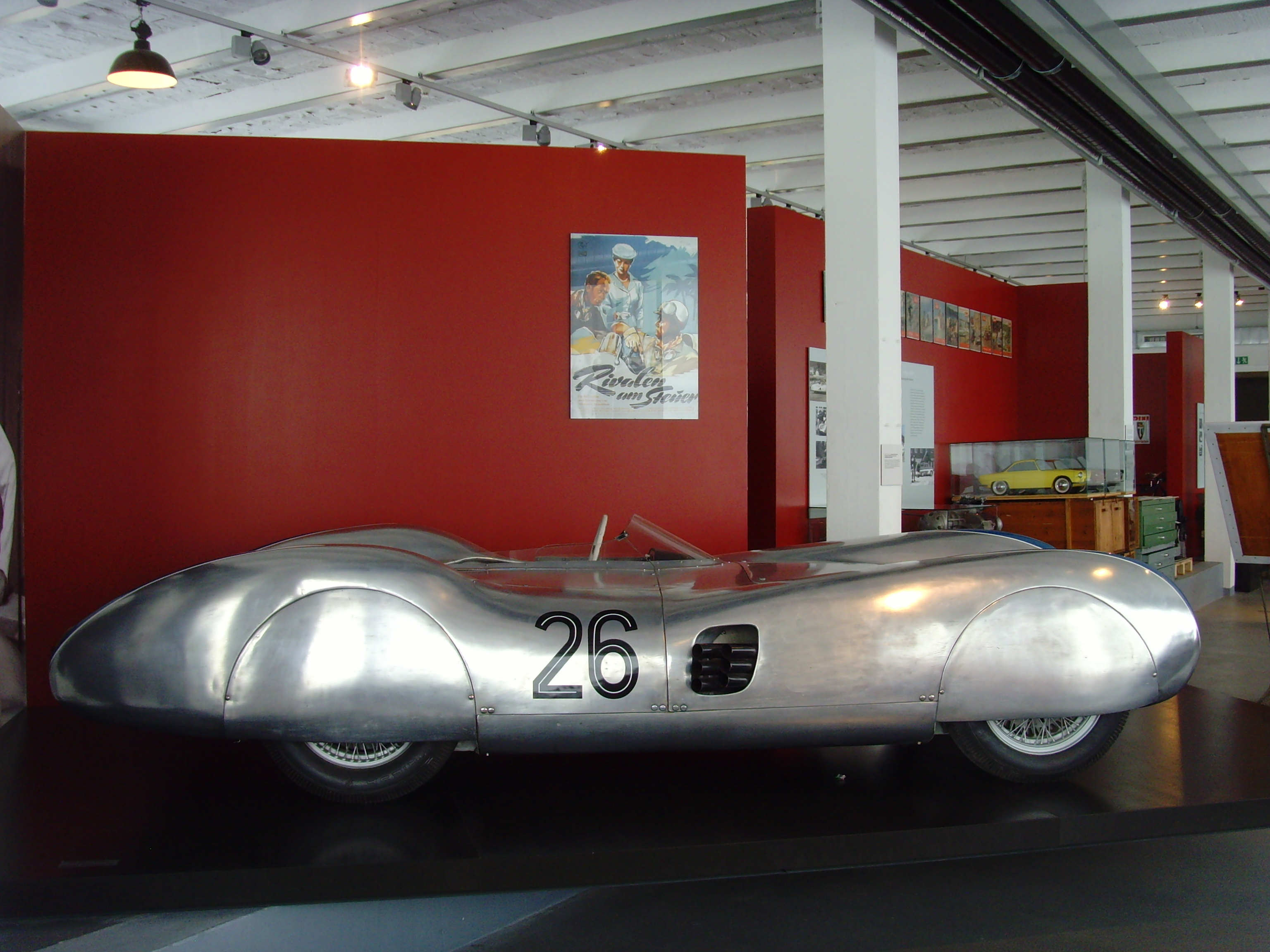 AWE R3 1,5l-Rennsportwagen 1956